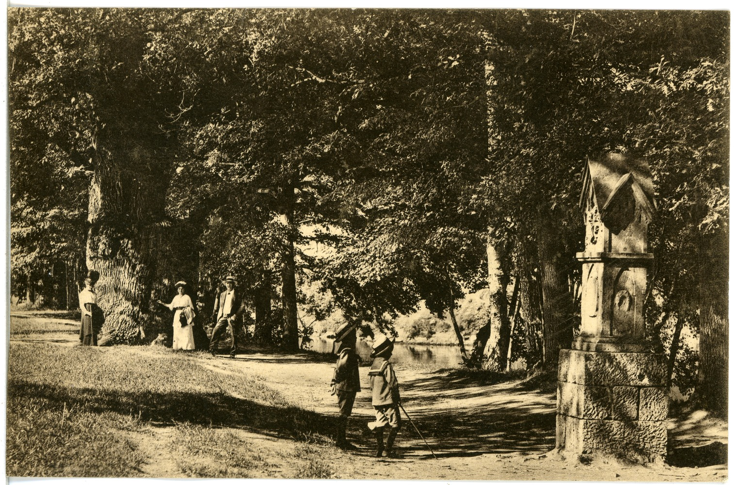 Lichtenwalde; Harraseiche und Denkmal This postcard is from publisher Brück & Sohn in Meißen ( postcard has a unique number 19413 and is available in a higher resolution at the publisher. This images was uploaded in a cooperation project between Wikipedians and the publisher.